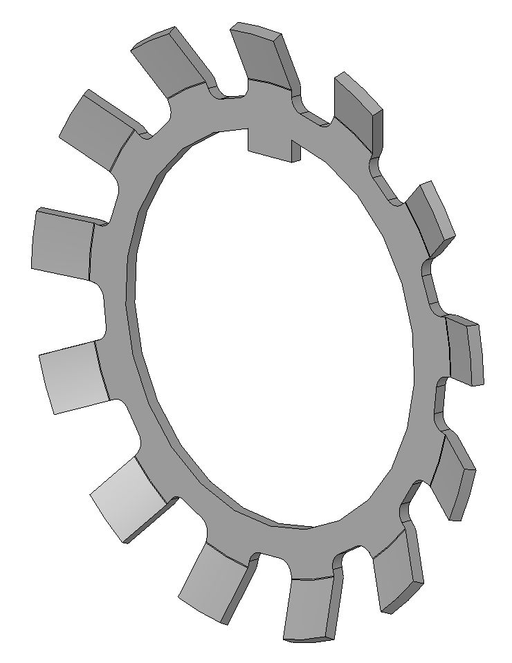 3D-Ansicht eines Sicherungsblechs nach DIN 5406. Diese Maschinenelemente sind in Verbindung mit Spannhuelsen zur formschluessigen Sicherung von Nutmuttern nach DIN981 vorgesehen.